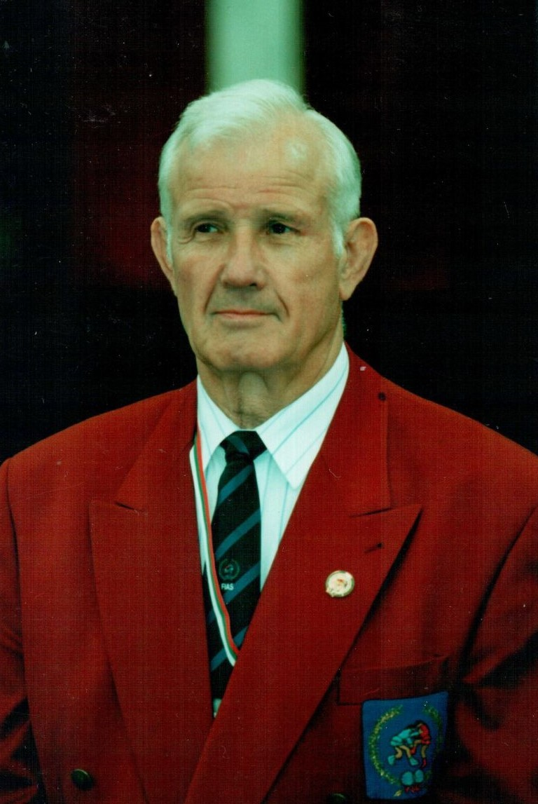 Lietuvos SAMBO Tėvas